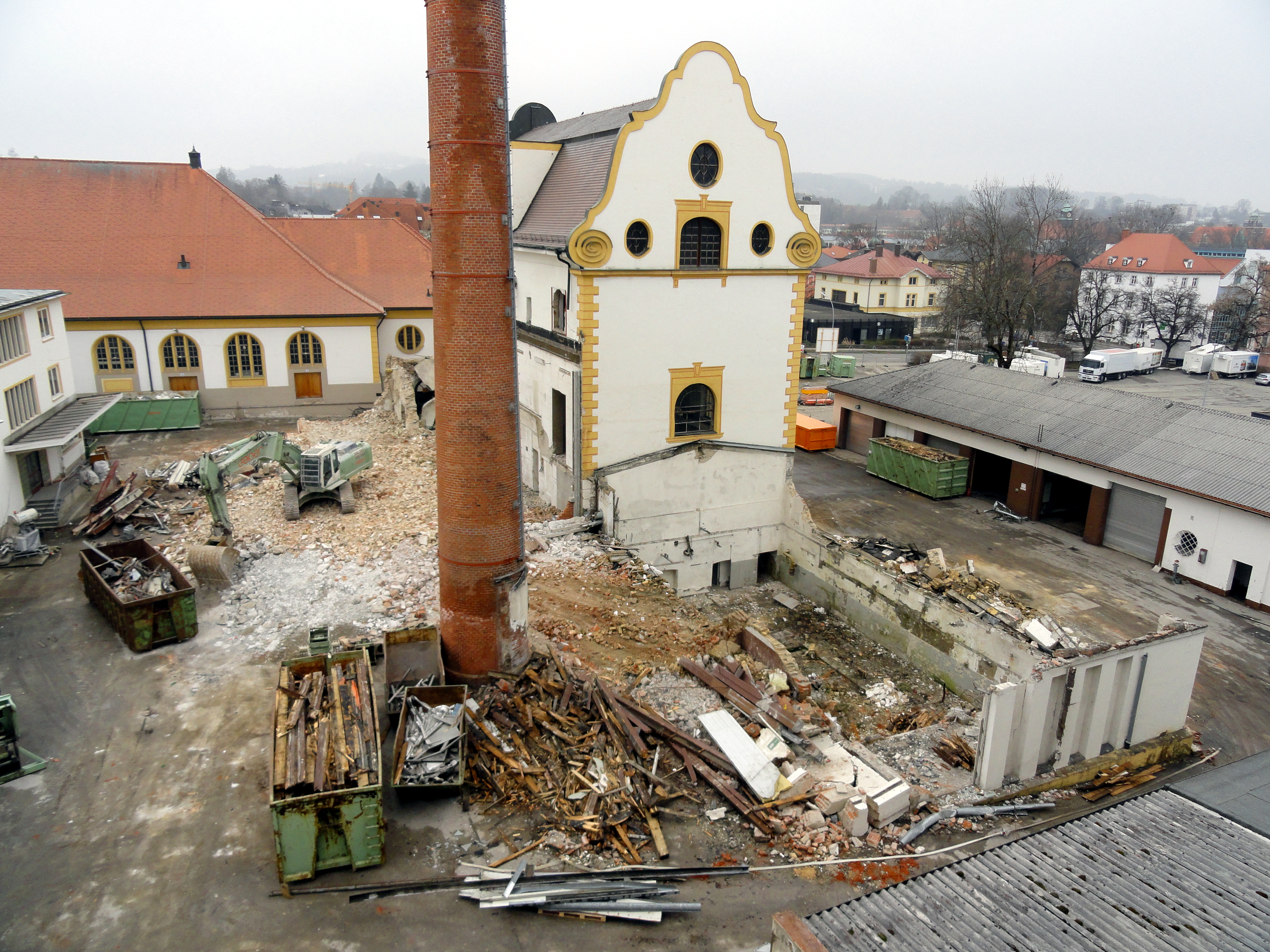 Erste Abrissarbeiten am Sudhaus Anfang April 2013